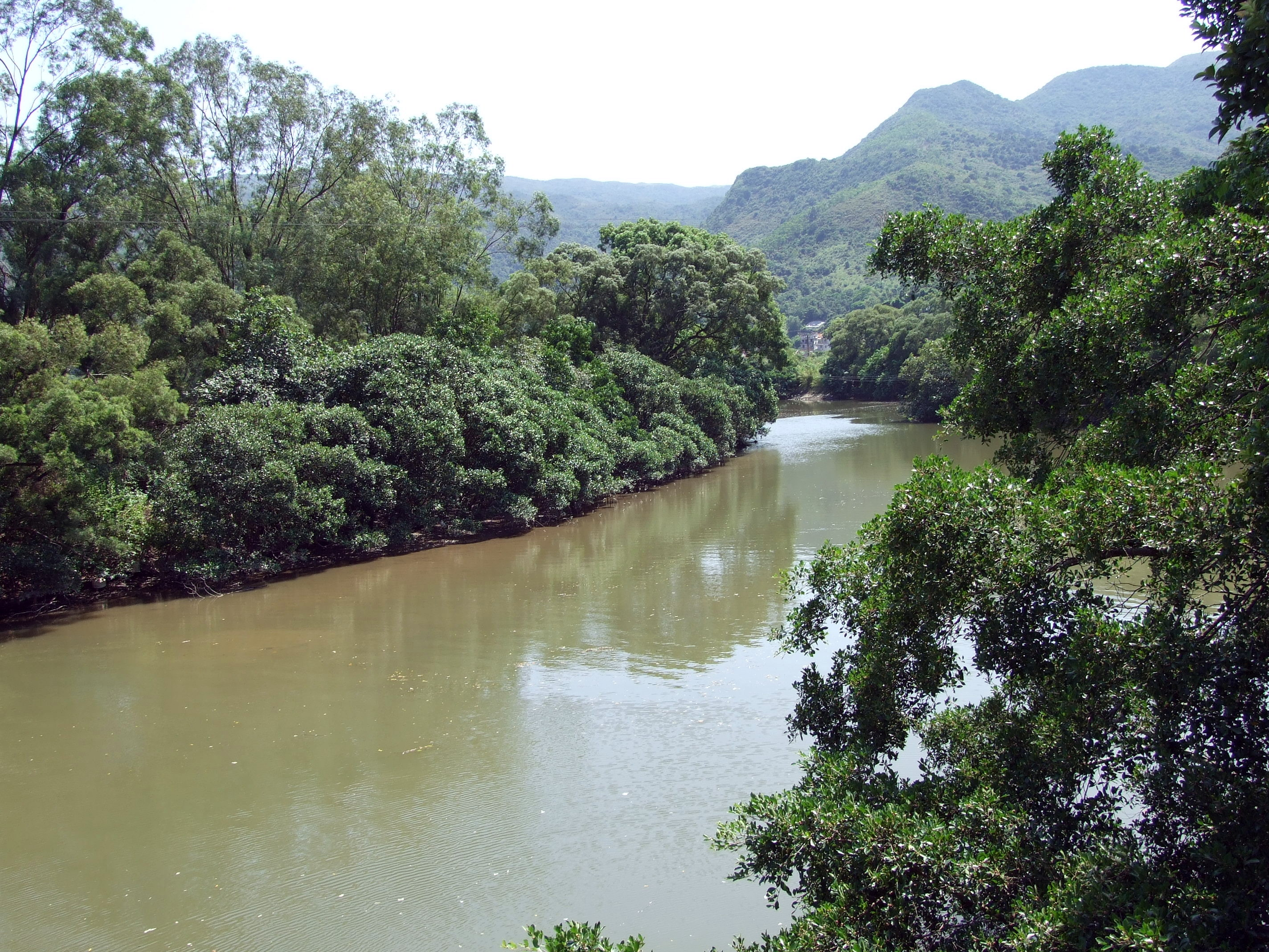 中文（香港）: 南涌河